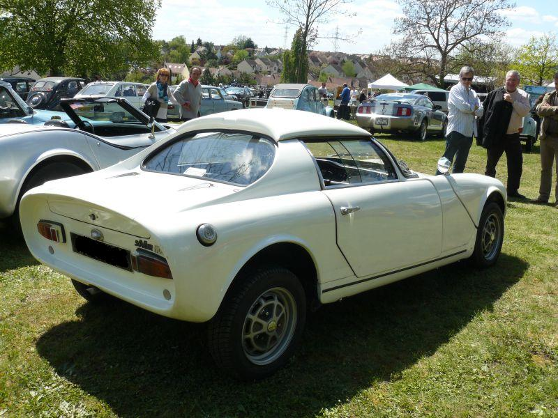 Photo prise à Chelles le 1er Mai 2012